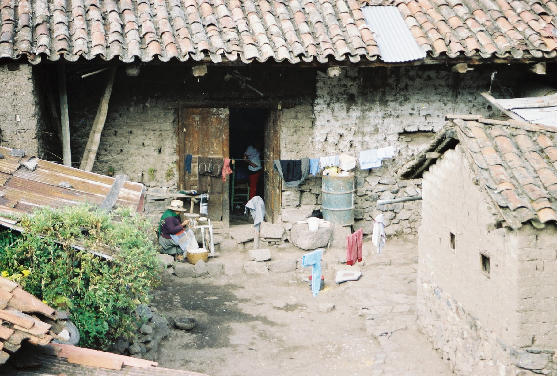 Der Hof eines in traditioneller Lehmbauweise errichteten Hauses mit einer Spinnerin. Chiquián/Peru 2002 von Uta Freund